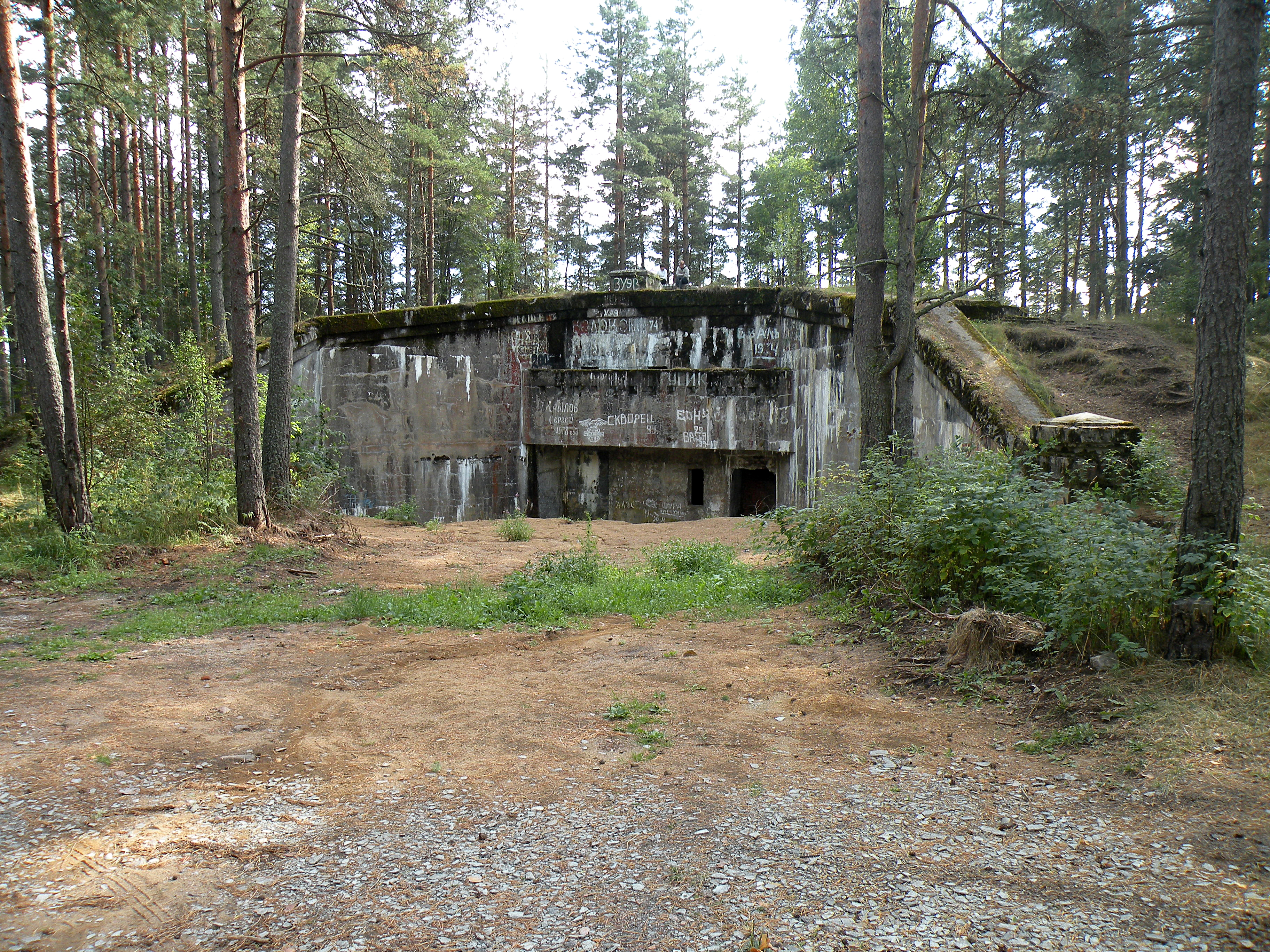 Форт Ино.Командно-дальномерный пост